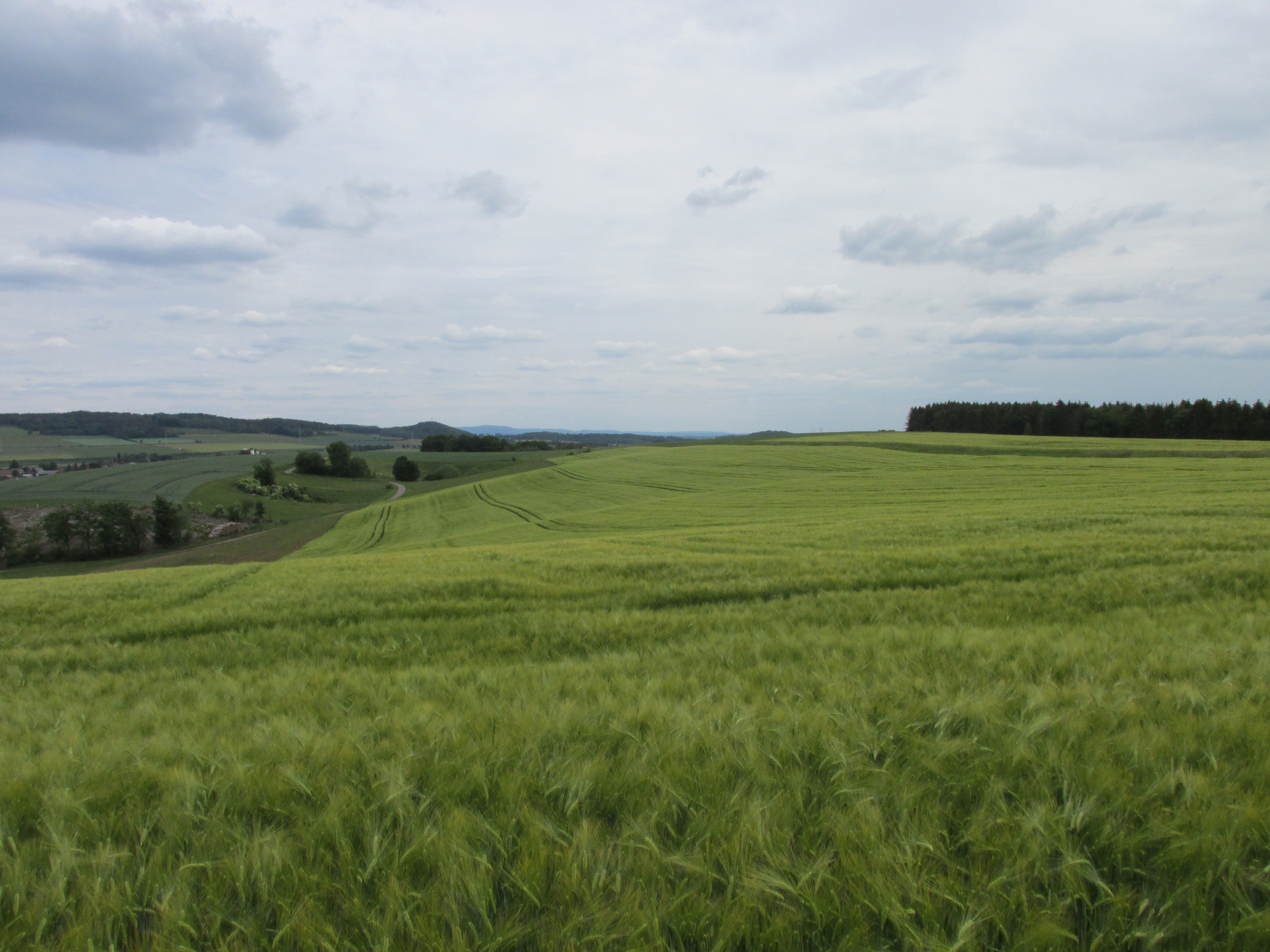 Blick vom Feldweg südlich von Bartolfelde nach Osten auf den Jacobsberg